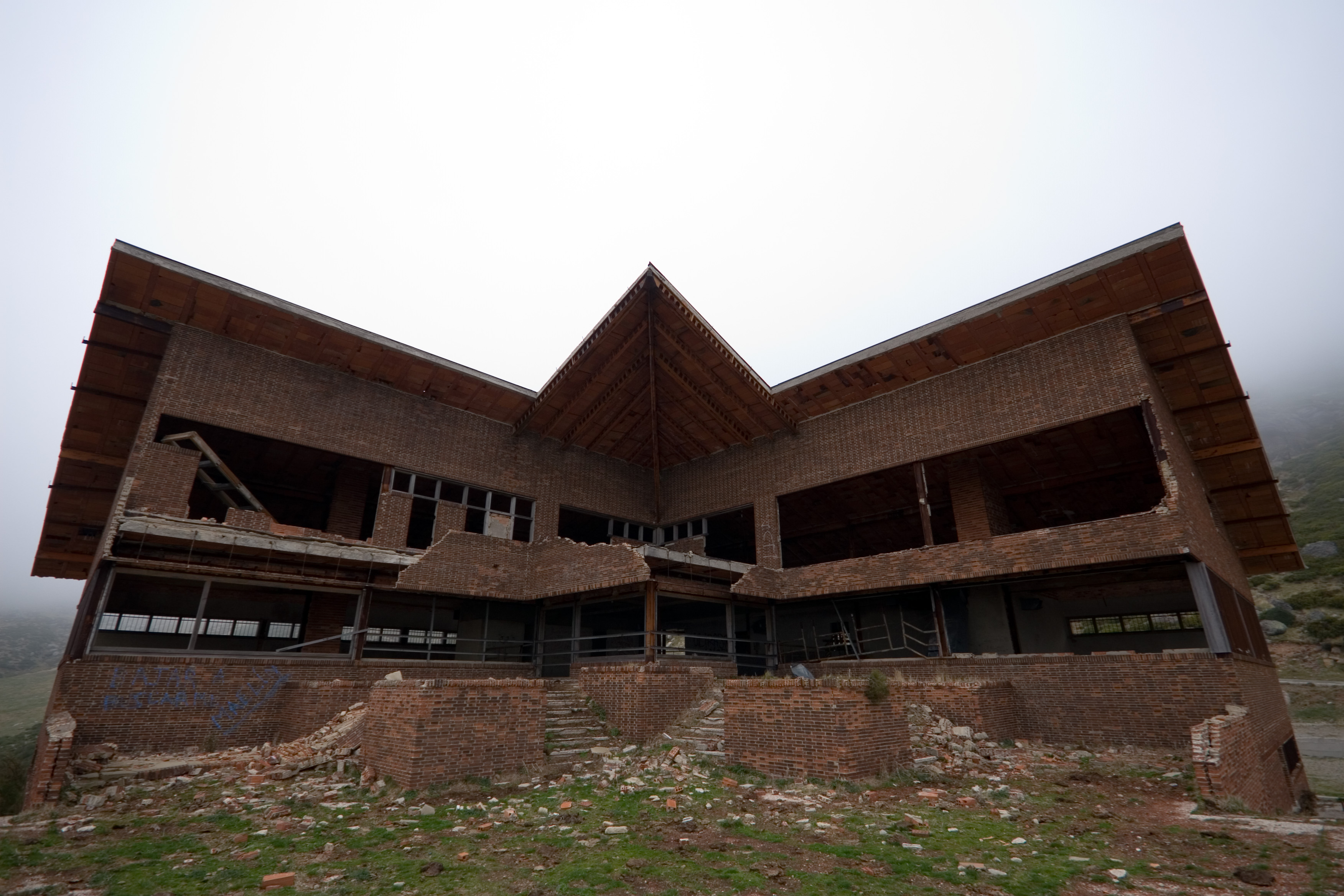 Antigua construcción destinada a un Parador de Turismo en El Golobar, Montaña Palentina (España)